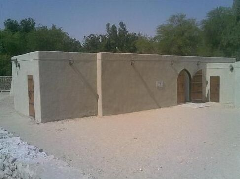 مسجد جواثا - ثاني مسجد أقيمت فيه صلاة الجمعة بعد مسجد رسول الله صلى الله عليه و آله و سلم في المدينة المنورة ، وهو يقع في مدينة الأحساء شرقي المملكة العربية السعودية